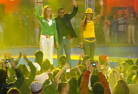 Mr. President, German euro-dance group in concert